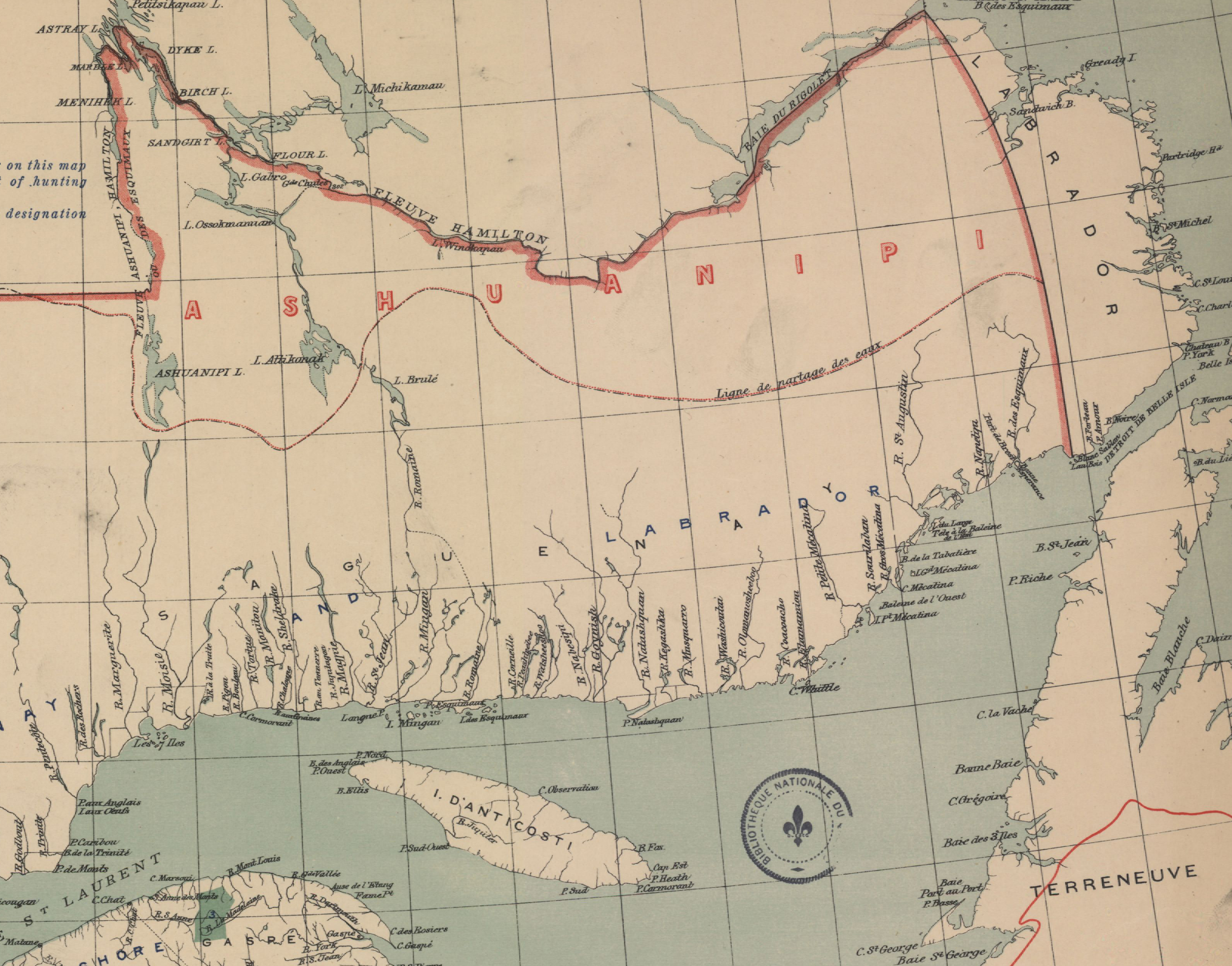 Carte de la province de Québec indquant ses frontières nord, nord-ouest et nord-est telles que reconnues par les Statuts du CANADA, 61 Victoria, cap. 3.